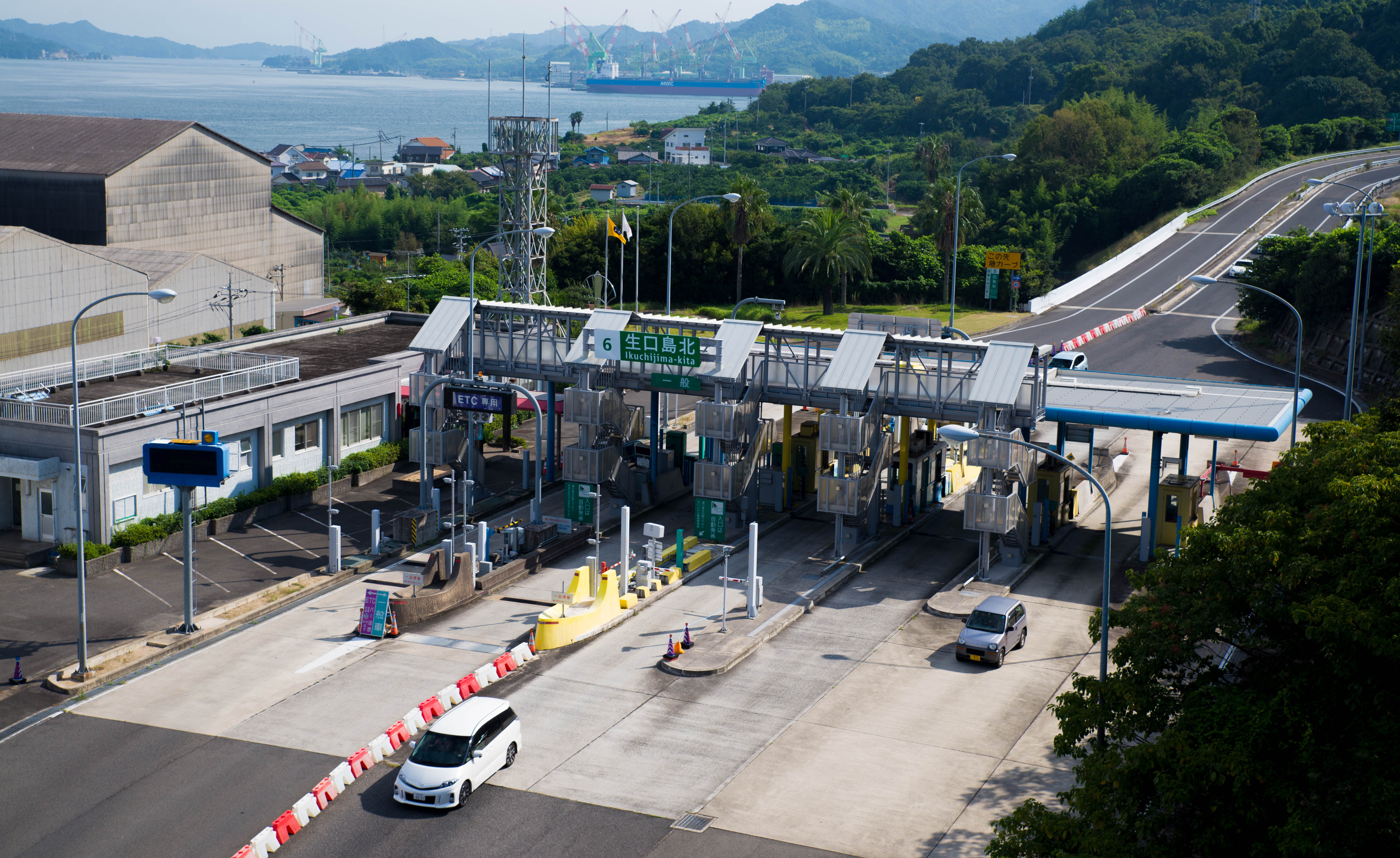 西瀬戸自動車道生口島北インターチェンジ（生口橋より見る）